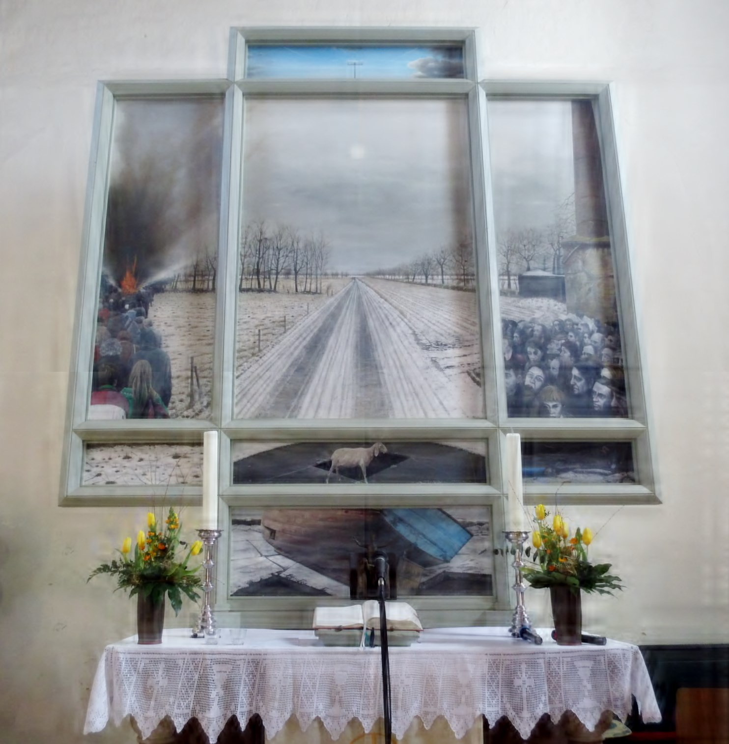 Altar von Hermann Buß (* 1951) in Ardorf, Stadtteil der Stadt Wittmund, Landkreis Wittmund, Niedersachsen, Deutschland